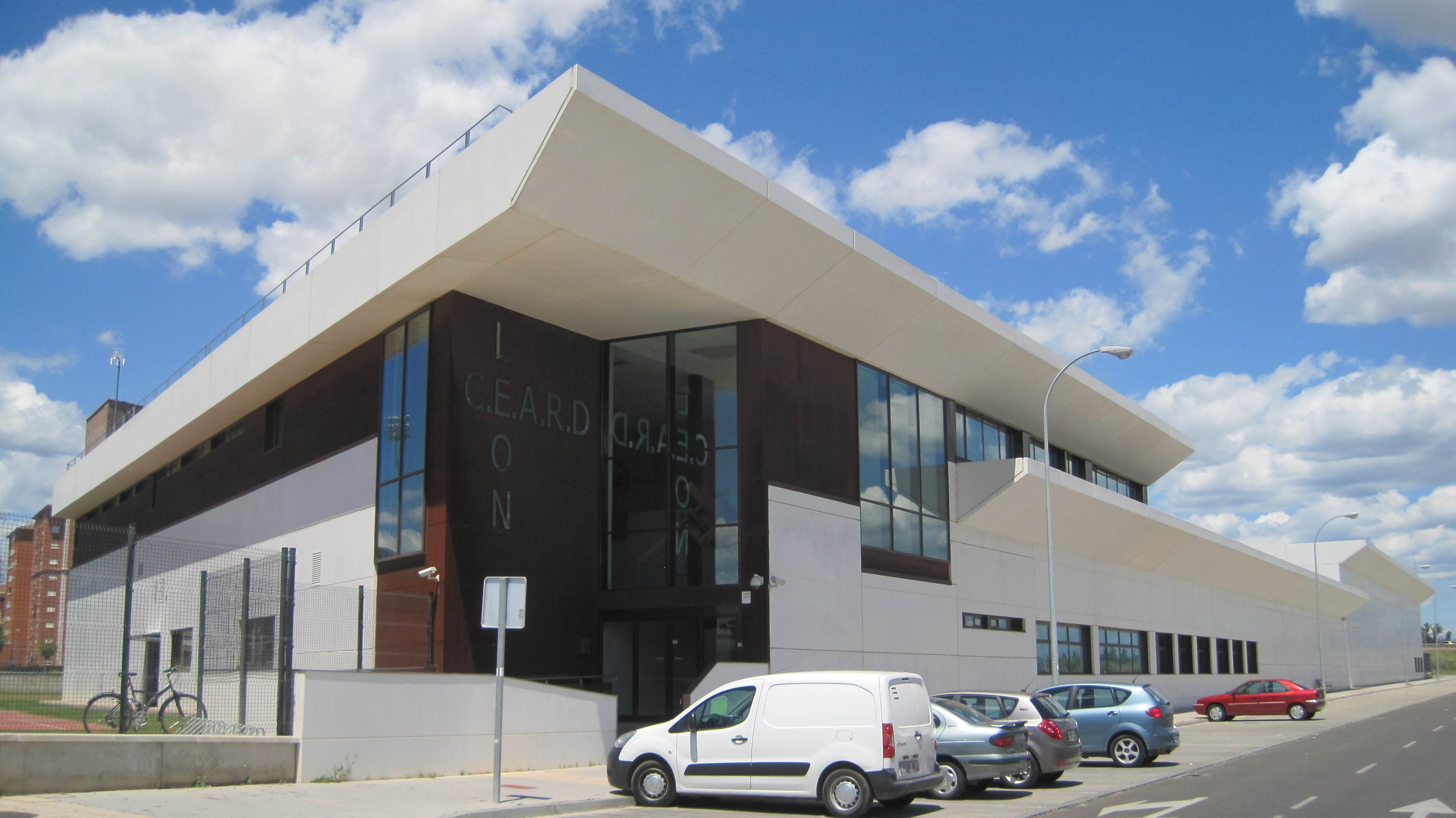 Centro de Alto Rendimiento (CAR) de León (España), anteriormente denominado Centro Especializado de Alto Rendimiento Deportivo (CEARD) de León.